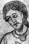 Spitygniew I